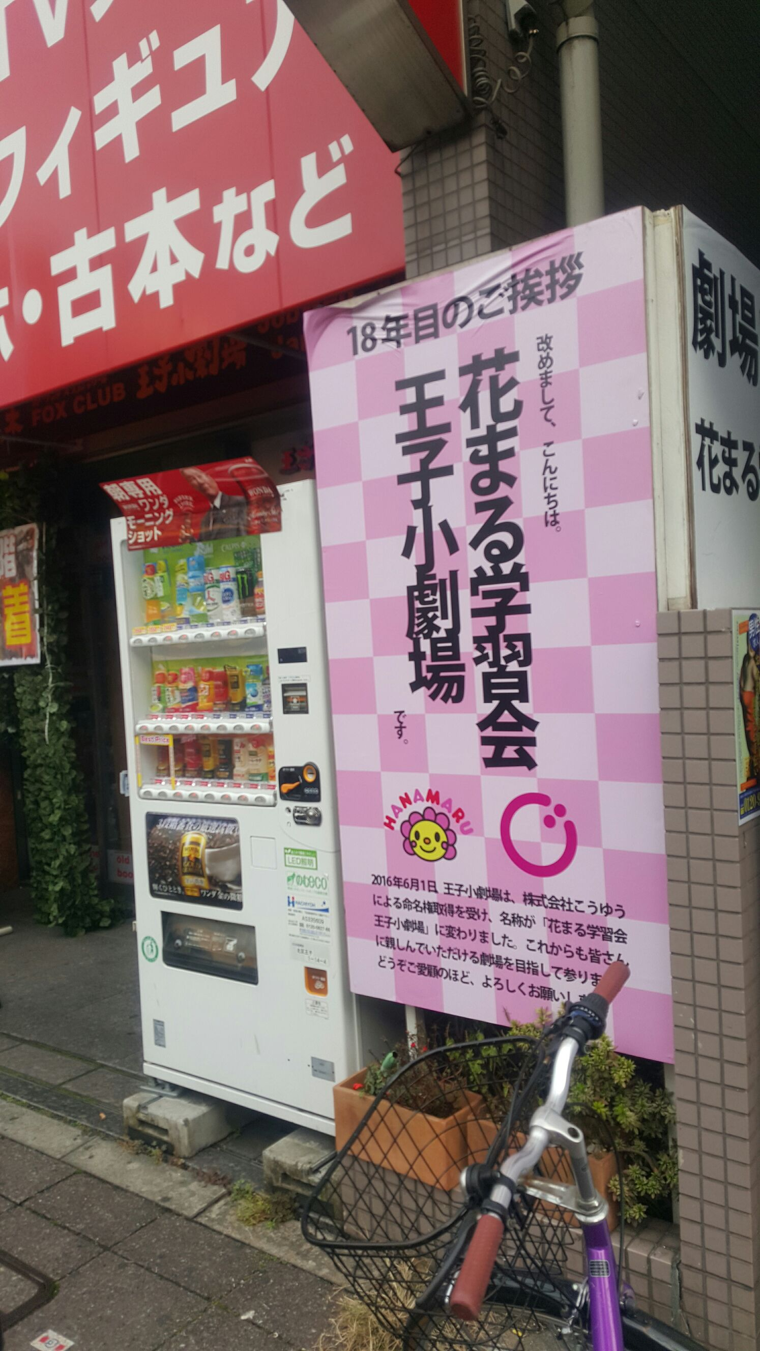 OJI-SHO-GEKIJO